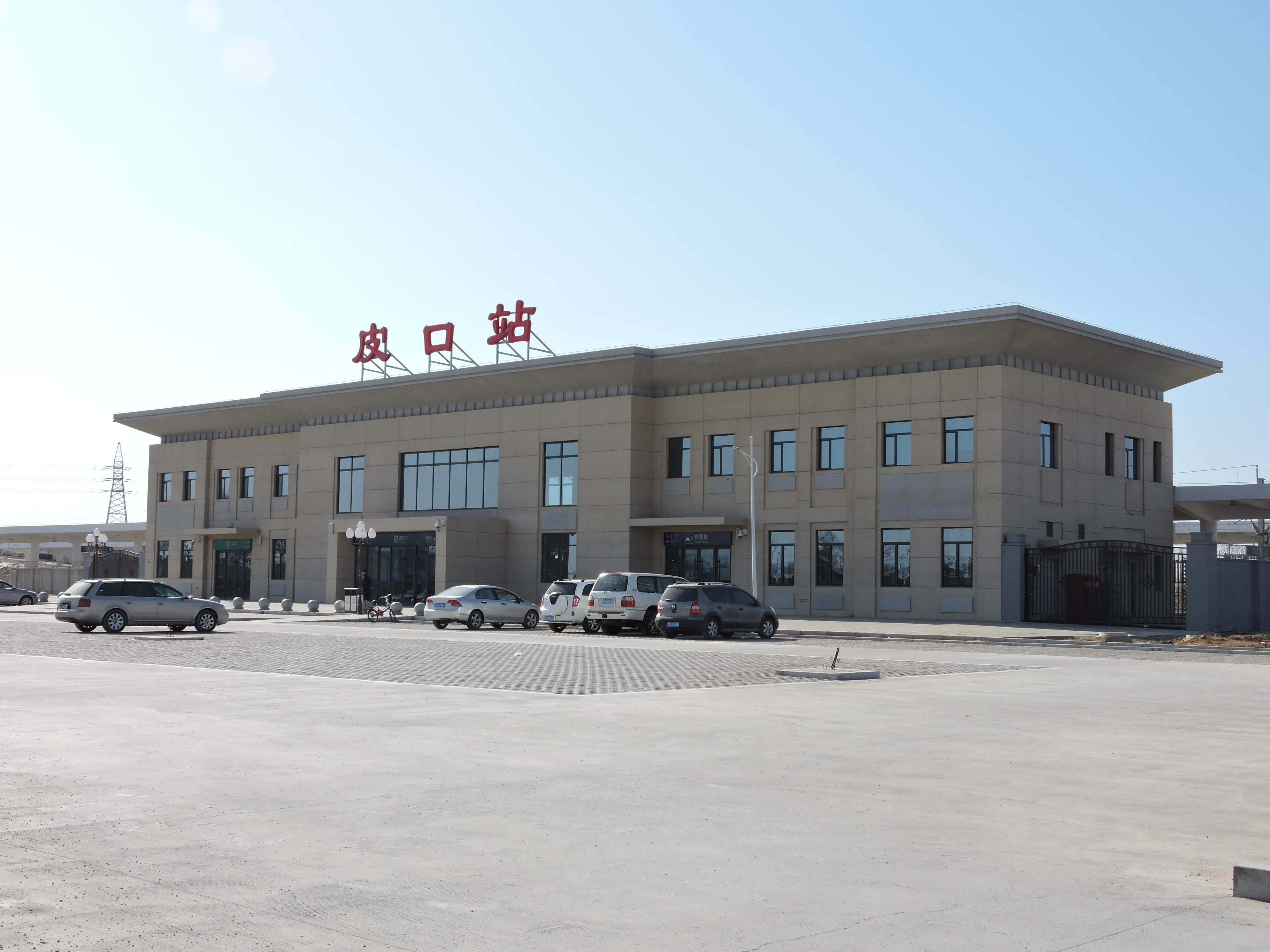 丹大快鉄・皮口駅